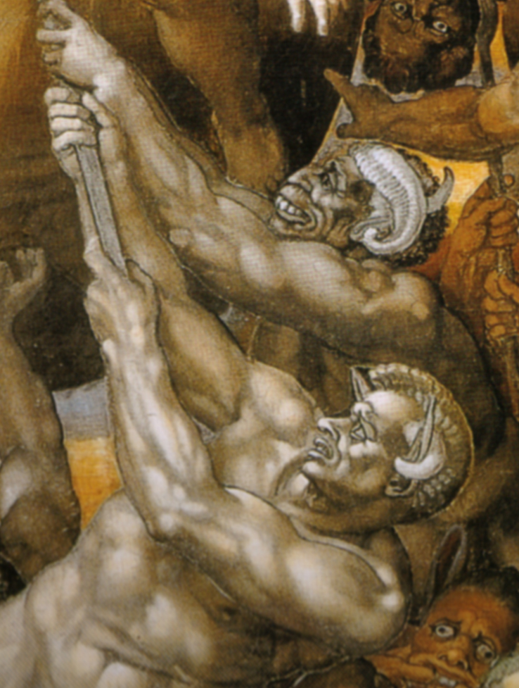 MICHELANGELO Buonarroti Last Judgment Fresco, 1370 x 1220 cm Cappella Sistina, Vatican